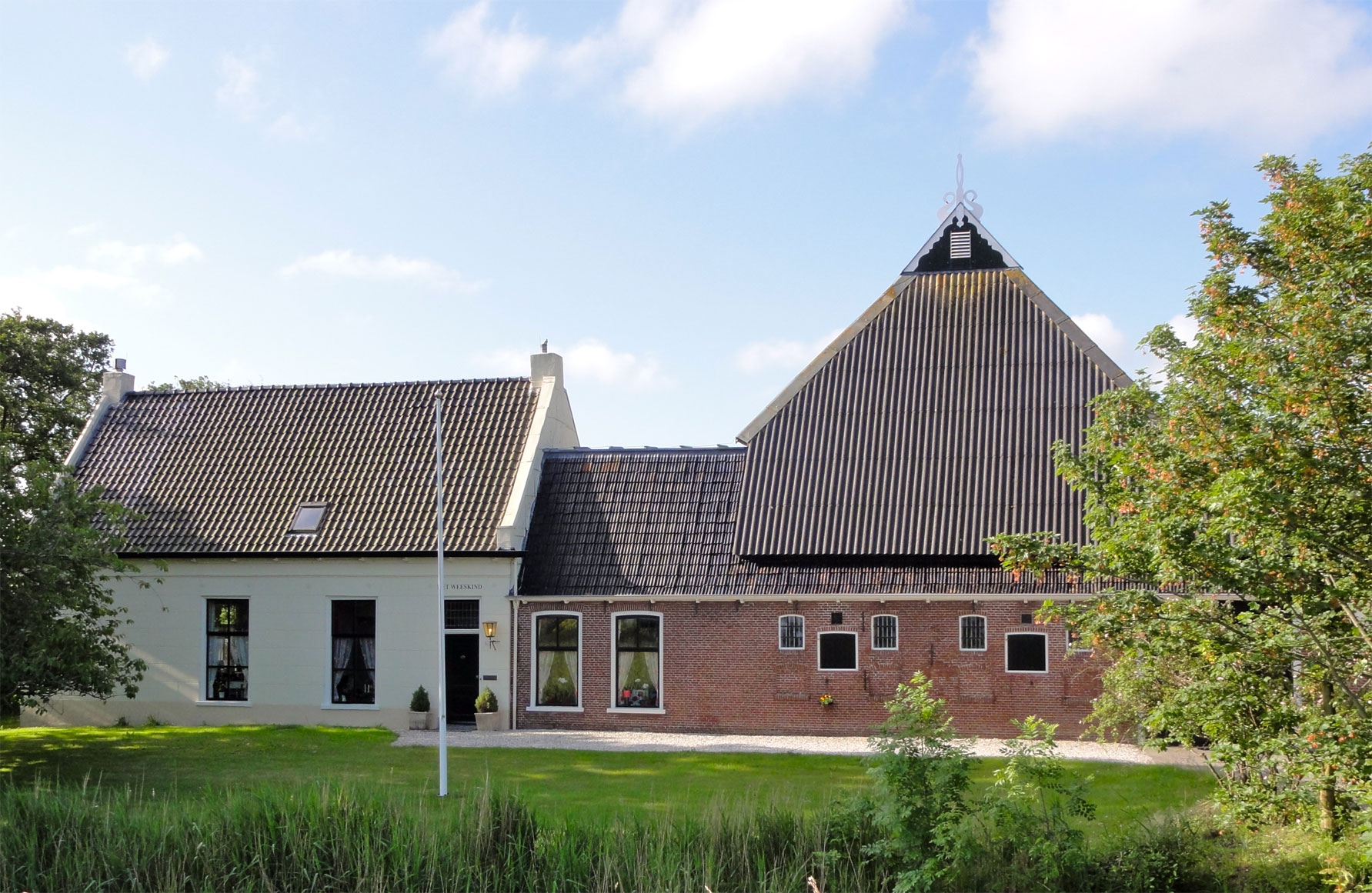 Oudebildtdijk 627 in Sint-Jacobiparochie